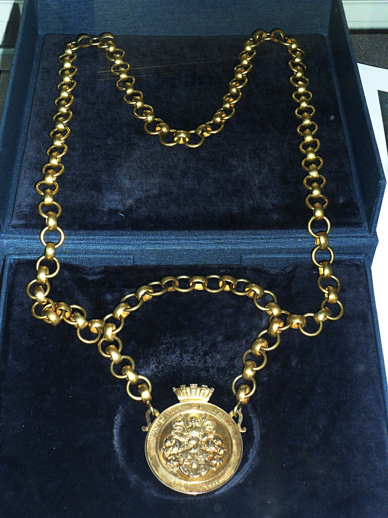 Amtskette des Oberbürgermeisters von Breslau Schläsch: Oamtskeete des Aeber-Birgermeesters (-Burgemeesters) vu Brassel